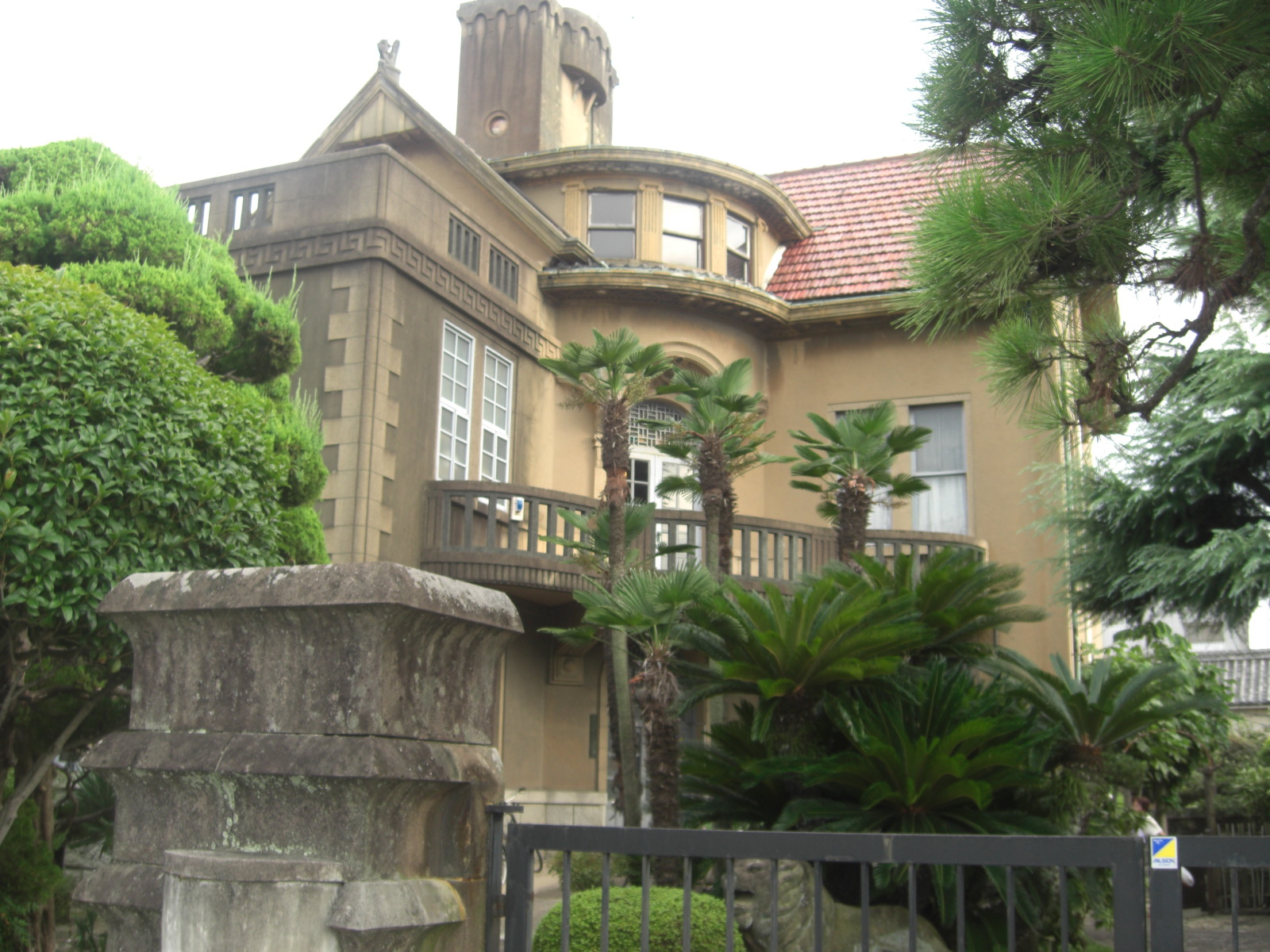 徳島県徳島市富田浜の三河家住宅。